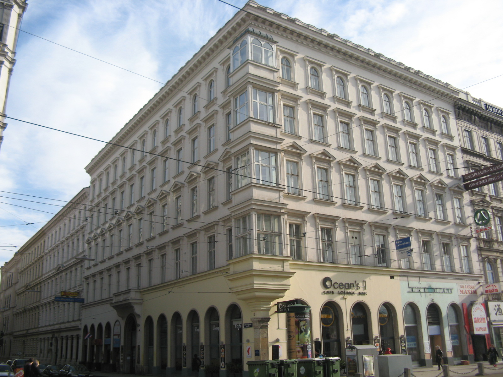 Eckhaus (1861) von Eduard Kuschée, Bösendorferstraße 2, Wien 1